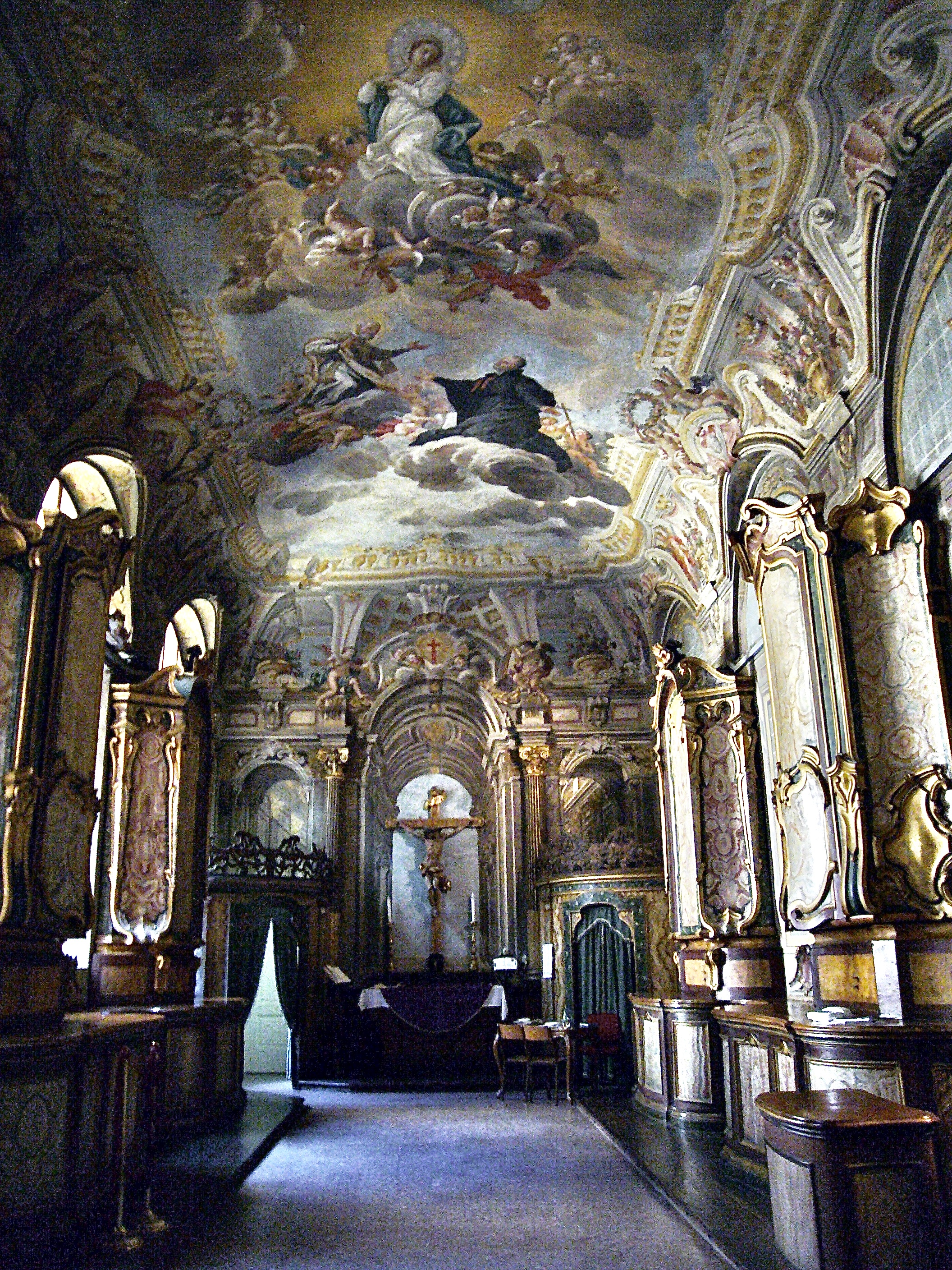 Sagrestia S.M. Maddalena